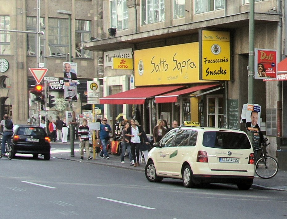 Foto von der Friedrich - Ecke Kochstr. zur Gegenüberstellung des historischen Fotos mit dem Grenzkino "City" am Checkpoint Charlie vom 15.08.1961. Zum Aufnahmezeitpunkt befindet sich an dem Ort des Grenzkinos "City" das Bar-Restaurant-Café "Sotto Sopra".